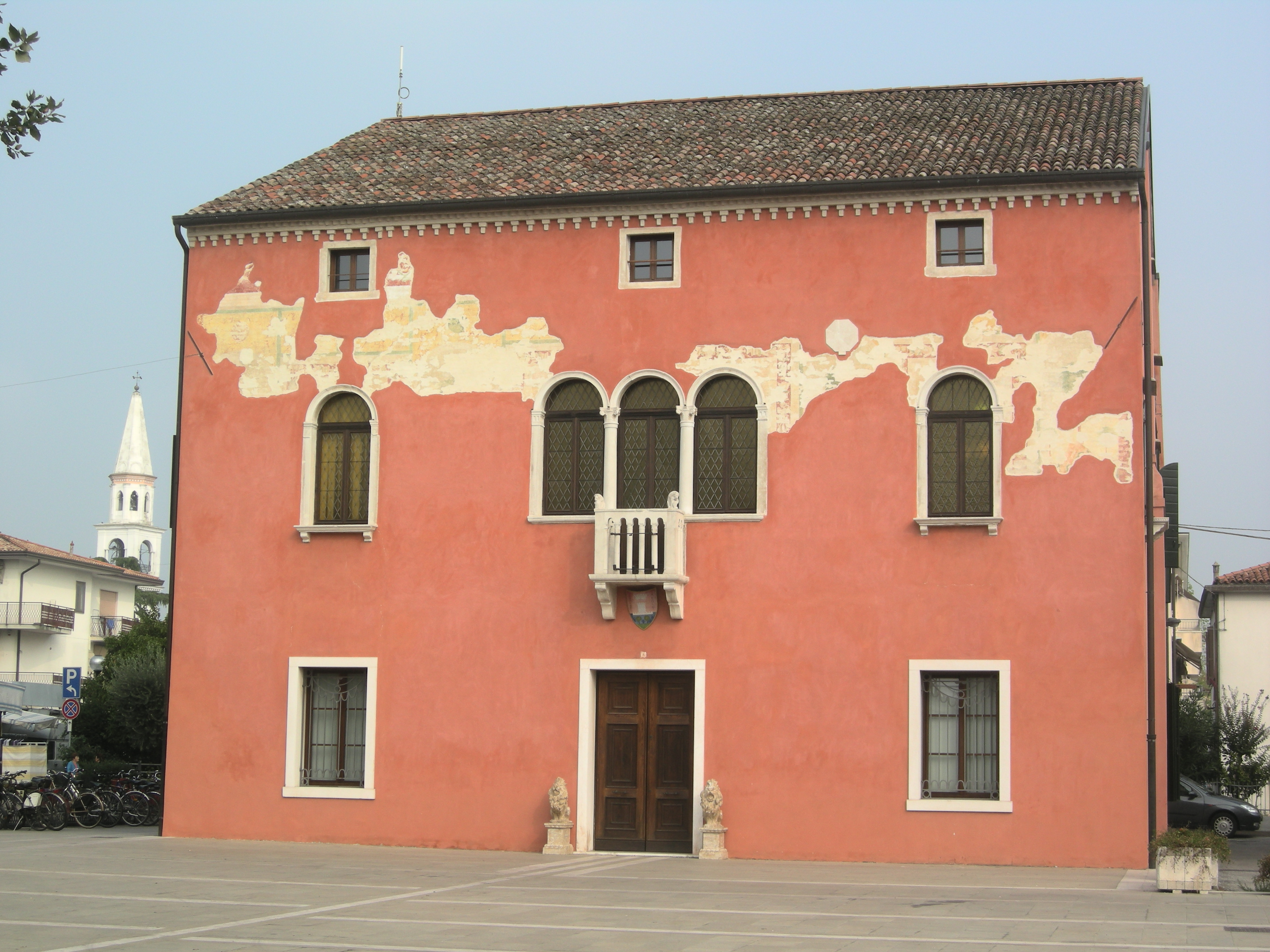 Cervellin, opera propria, vista munucipio Meolo VE Italy, GFDL, data 07.10.2009